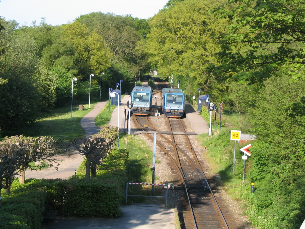 Ørholm Station, Sjælland